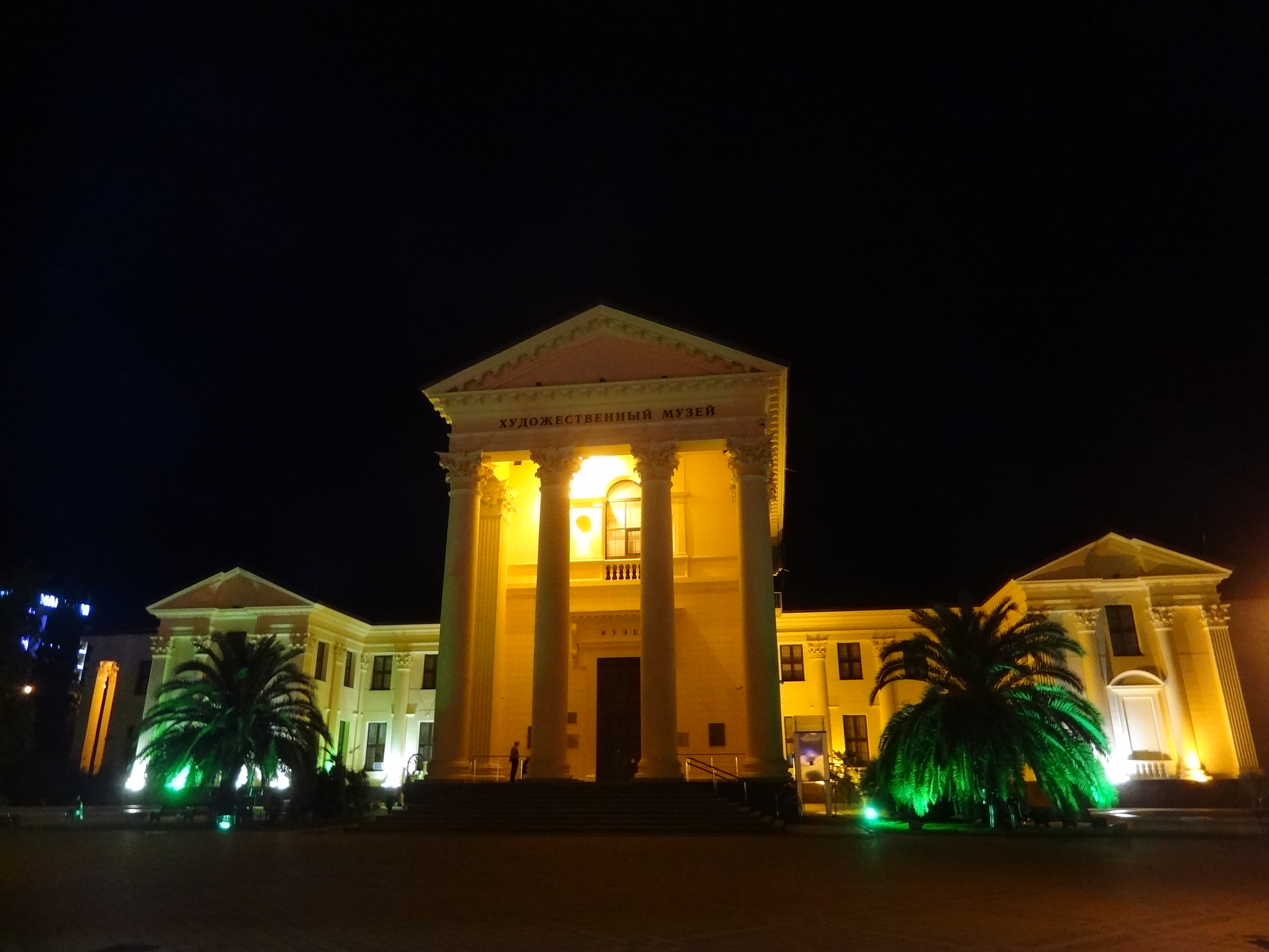 Сочинский художественный музей